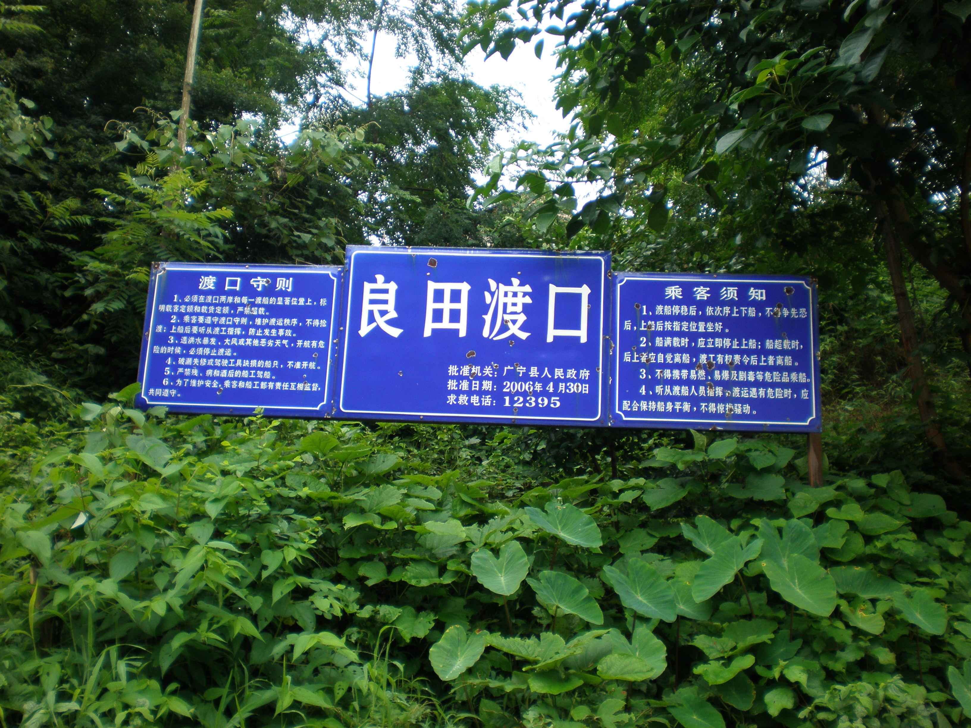 huaiji